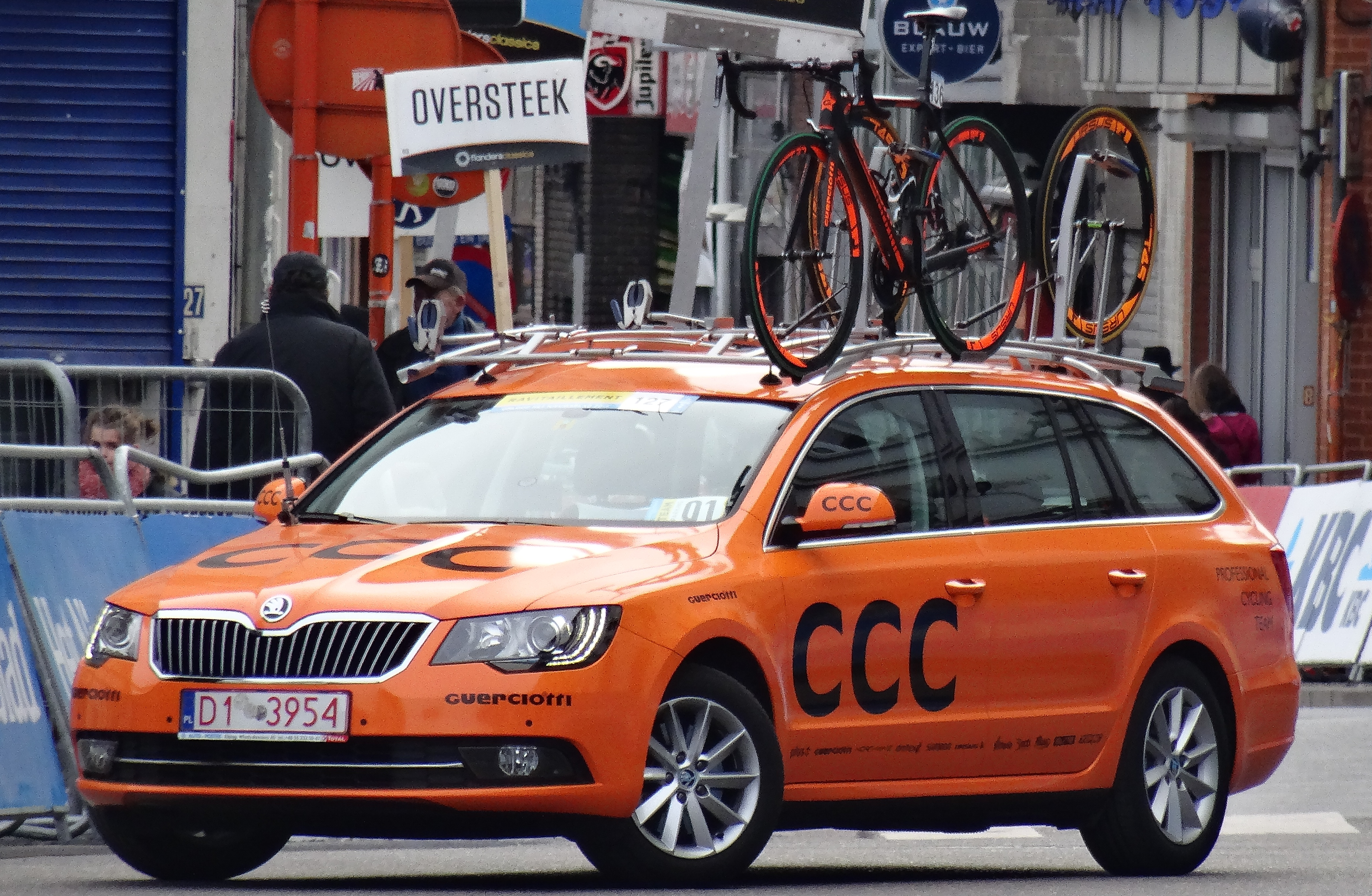 Reportage réalisé le samedi 28 février à l'occasion du départ et de l'arrivée du Circuit Het Nieuwsblad 2015 à Gand, Belgique.